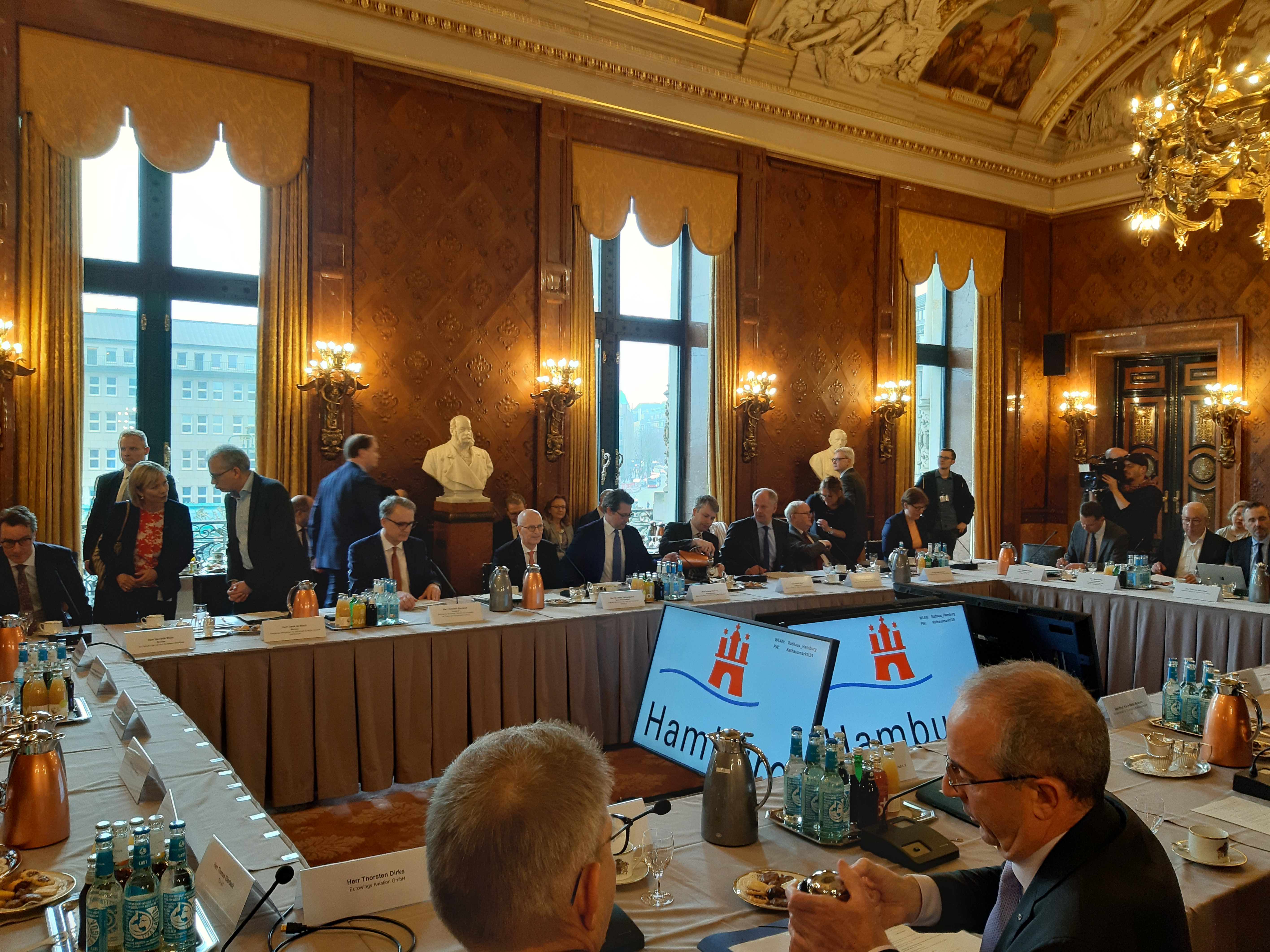 Spitzentreffen zur Luftfahrt 2019 im Kaisersaal